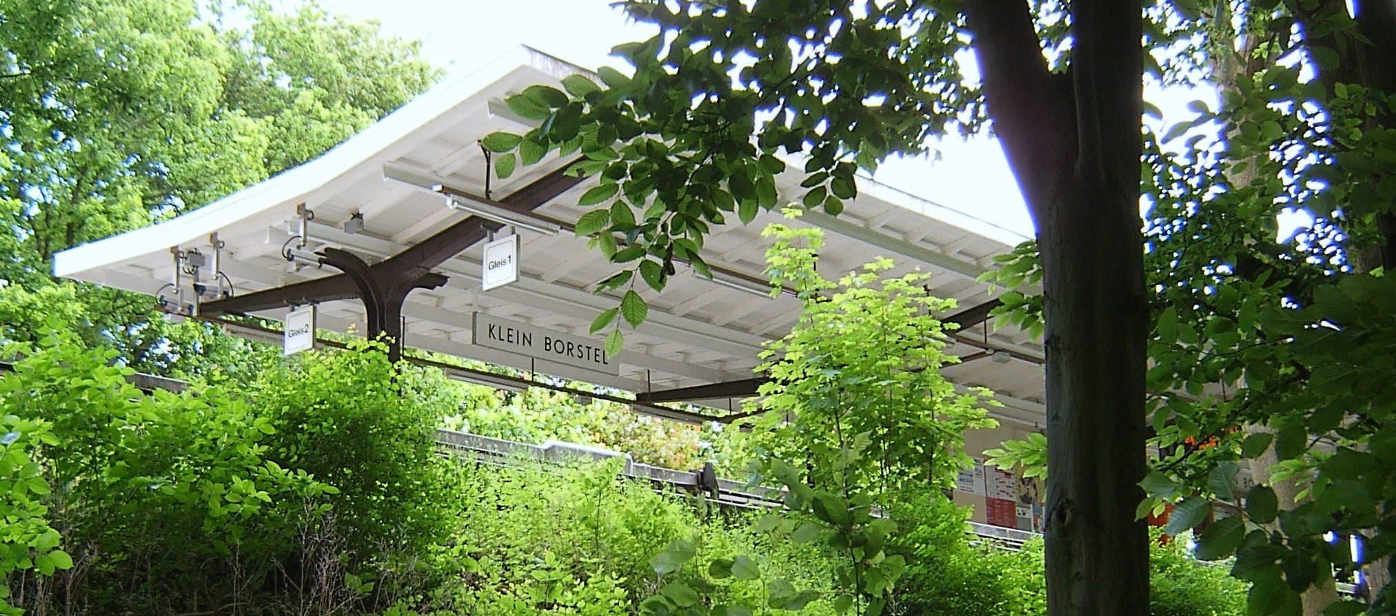 U-Bahnhof Klein Borstel in Ohlsdorf